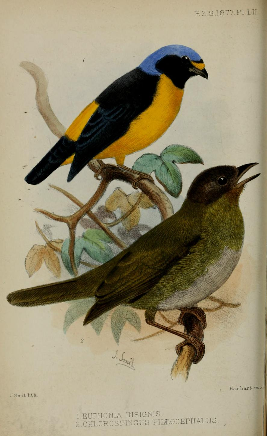 Up: Euphonia insignis = Euphonia cyanocephala insignis Down: Chlorospingus phaeocephalus = Chlorospingus flavopectus ssp. phaeocephalus (or Chlorospingus ophthalmicus phaeocephalus)